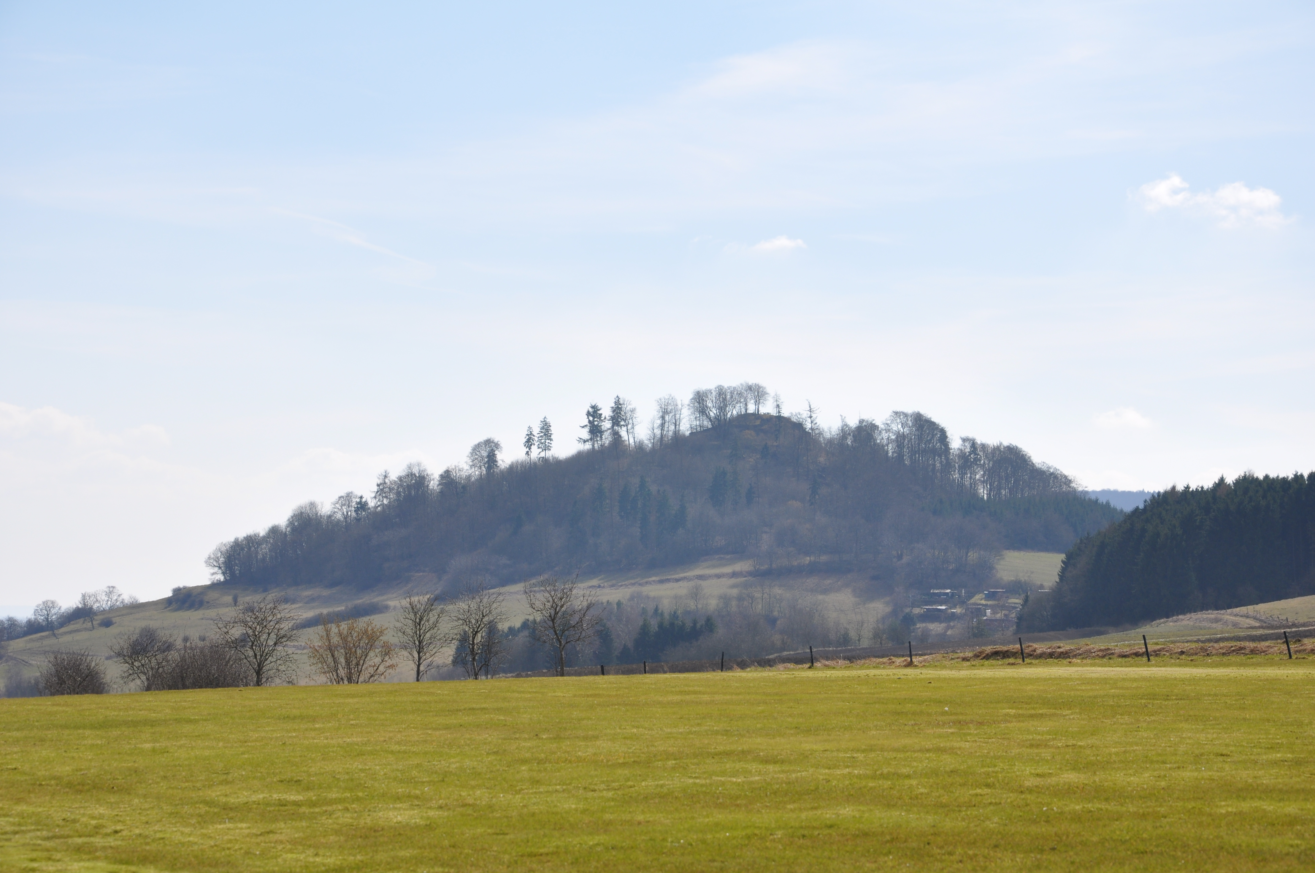 Blick von Norden, vorbei am Wäldchen des Kleinen Schönbergs, zum Burgberg